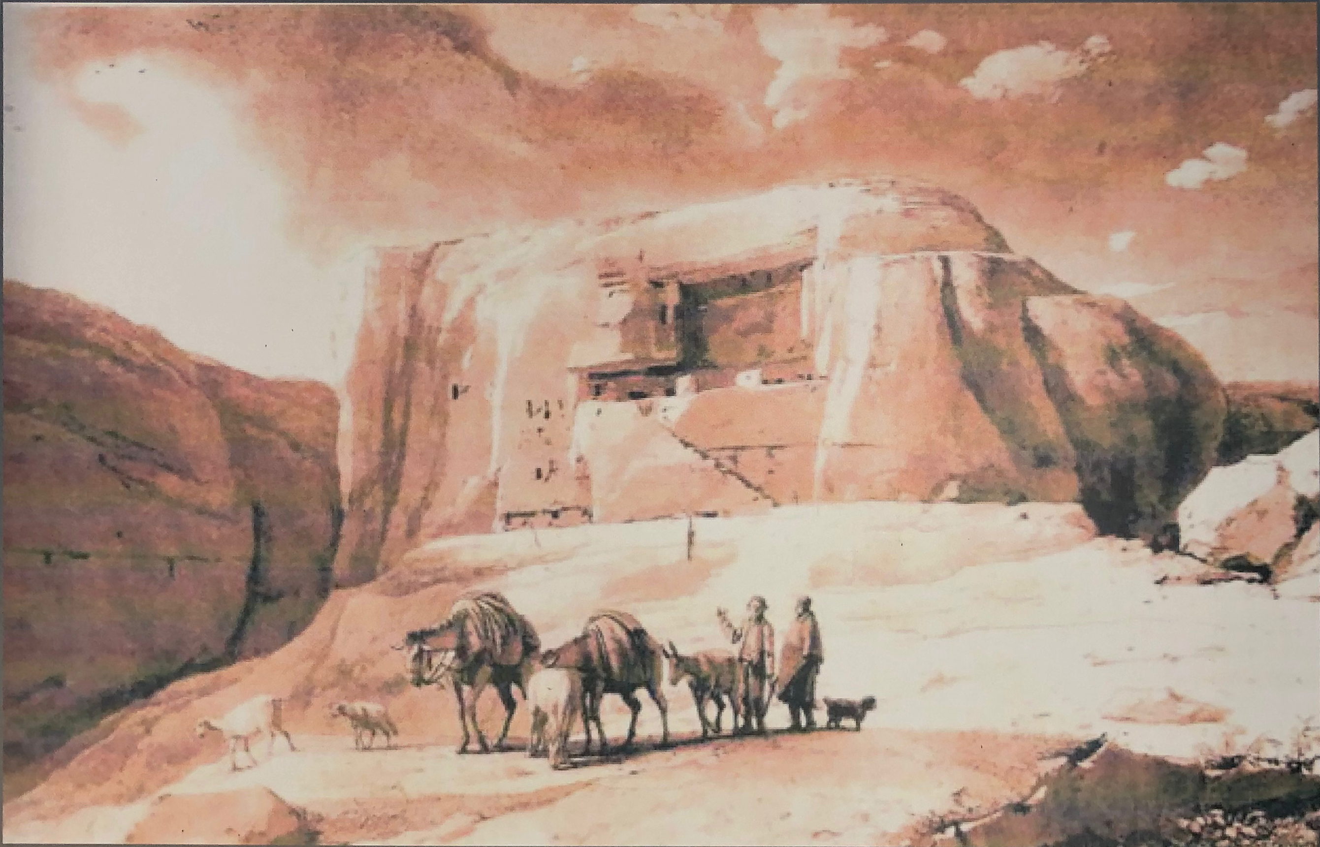 Castello Sicano a Cava d'Ispica